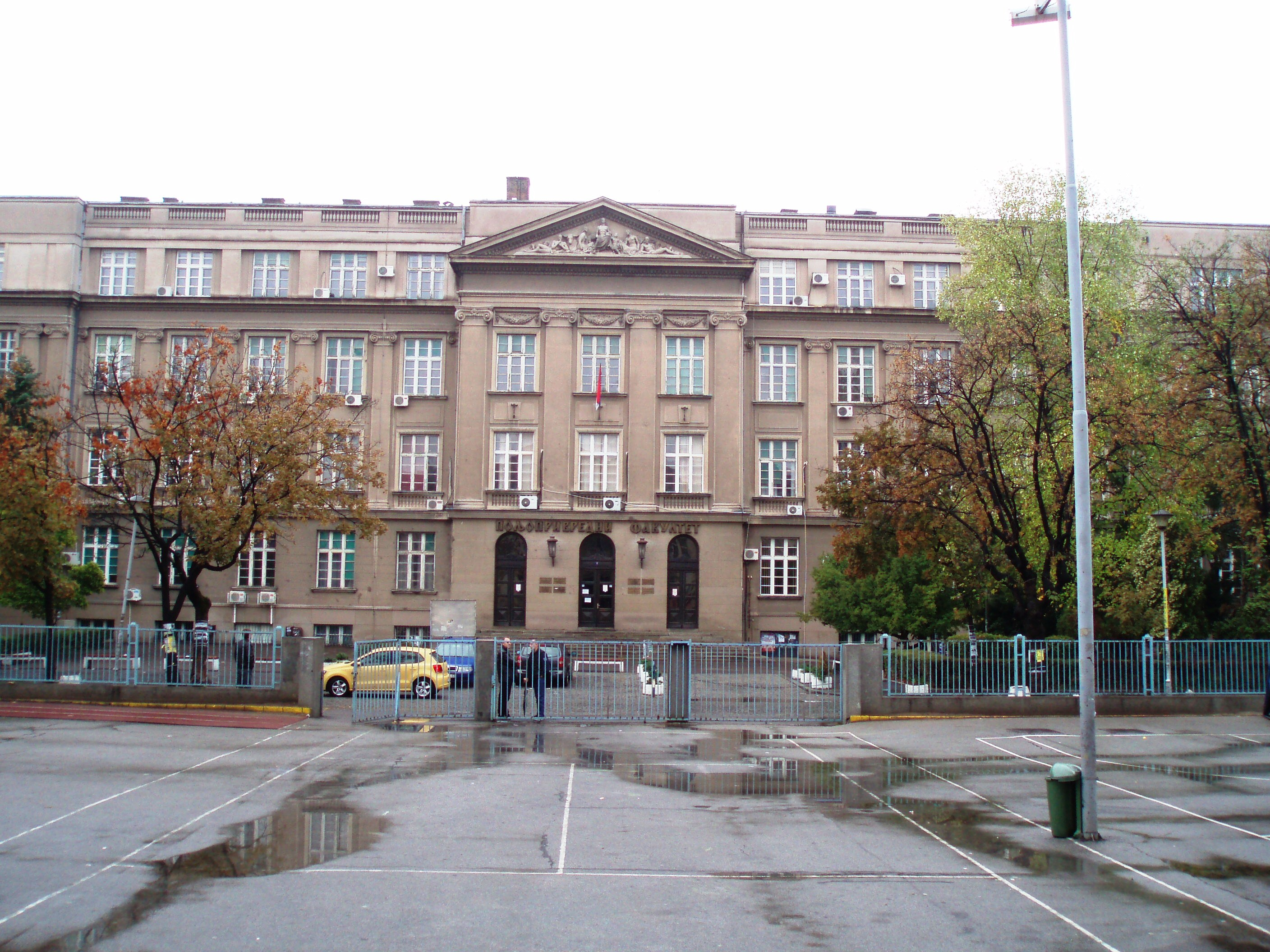 Fotografija Poljoprivrednog fakulteta u Zemunu, Autor:Nicolo